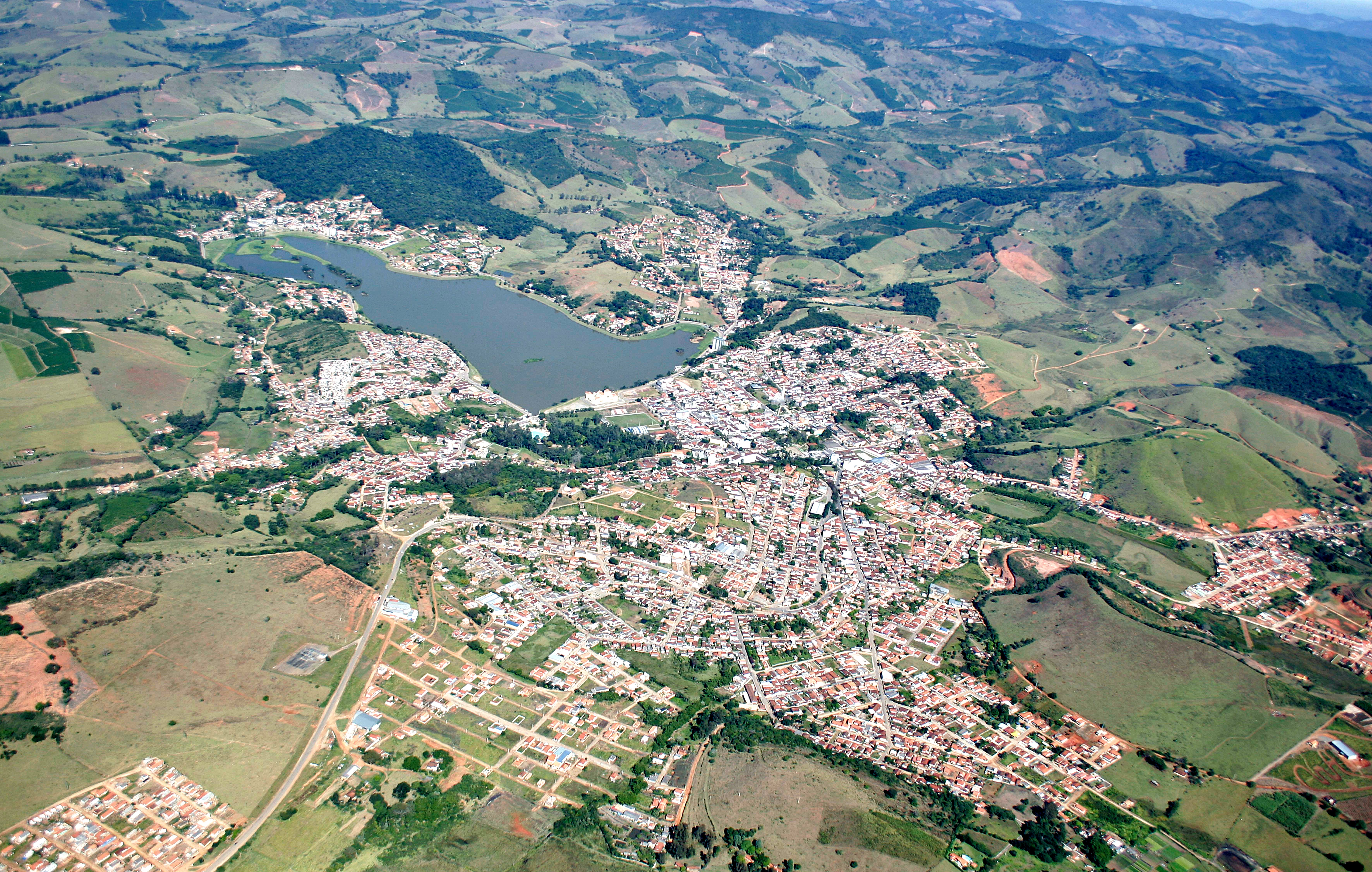 Vista aérea de Lambari-MG